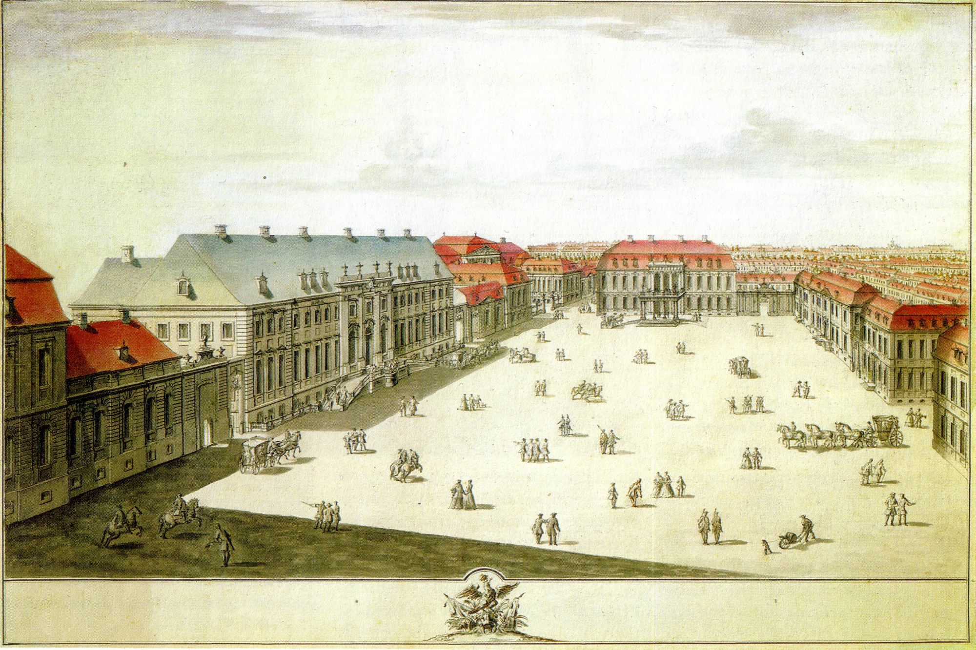 Wilhelmplatz in Berlin, Federzeichnung der geplanten Bebauung mit Blickrichtung Norden; davon verwirklicht wurden ab 1735 (von links) a) die Gold- und Silbermanufaktur, b) das den Platz dominierende Palais Marschall, c) das Palais Schulenburg, später als Reichskanzlei Sitz der deutschen Reichskanzler, d) das Palais Waldburg bzw. Ordenspalais an der Nordseite des Platzes. Nicht gebaut wurde das hier vorgesehene Palais an der Nordostseite des Wilhelmplatzes.